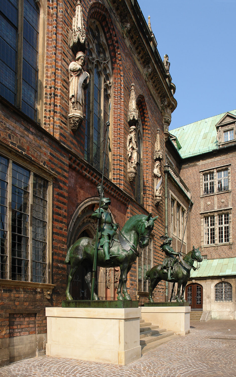 Rathaus in Bremen. Reiterstatuen am Ostportal. Entwurf: Rudolf Maison Das abgebildete Objekt ist ein geschütztes Kulturdenkmal in der Freien Hansestadt Bremen, mit der Nr. 0066,T004 beim Landesamt für Denkmalpflege registriert.